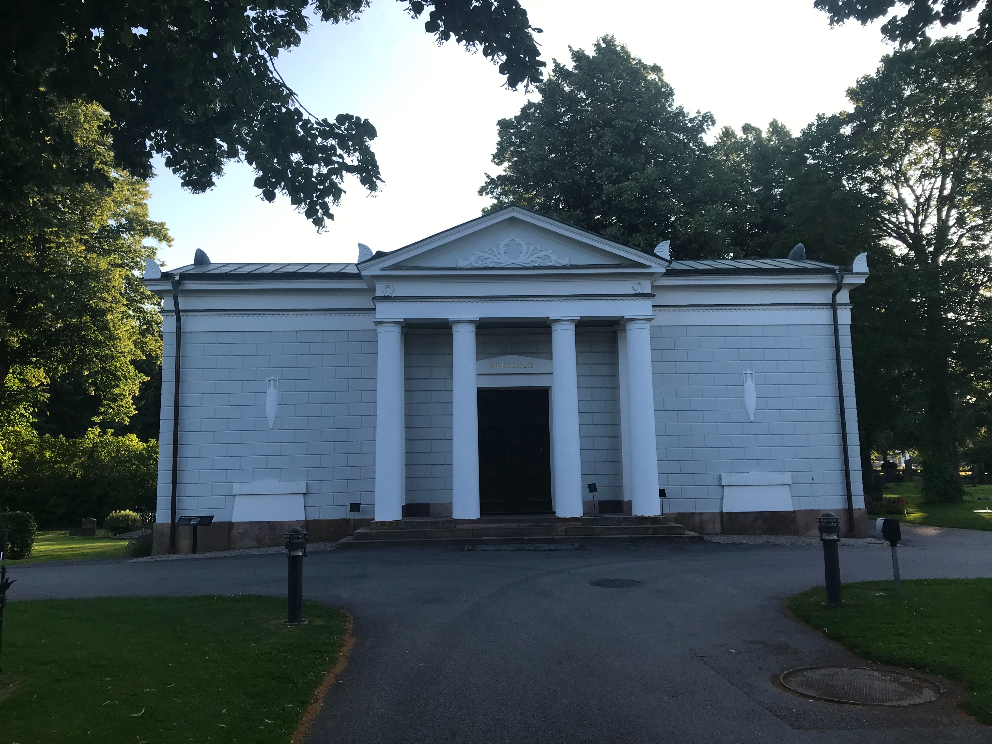 Gävle, Sverige, July 2019